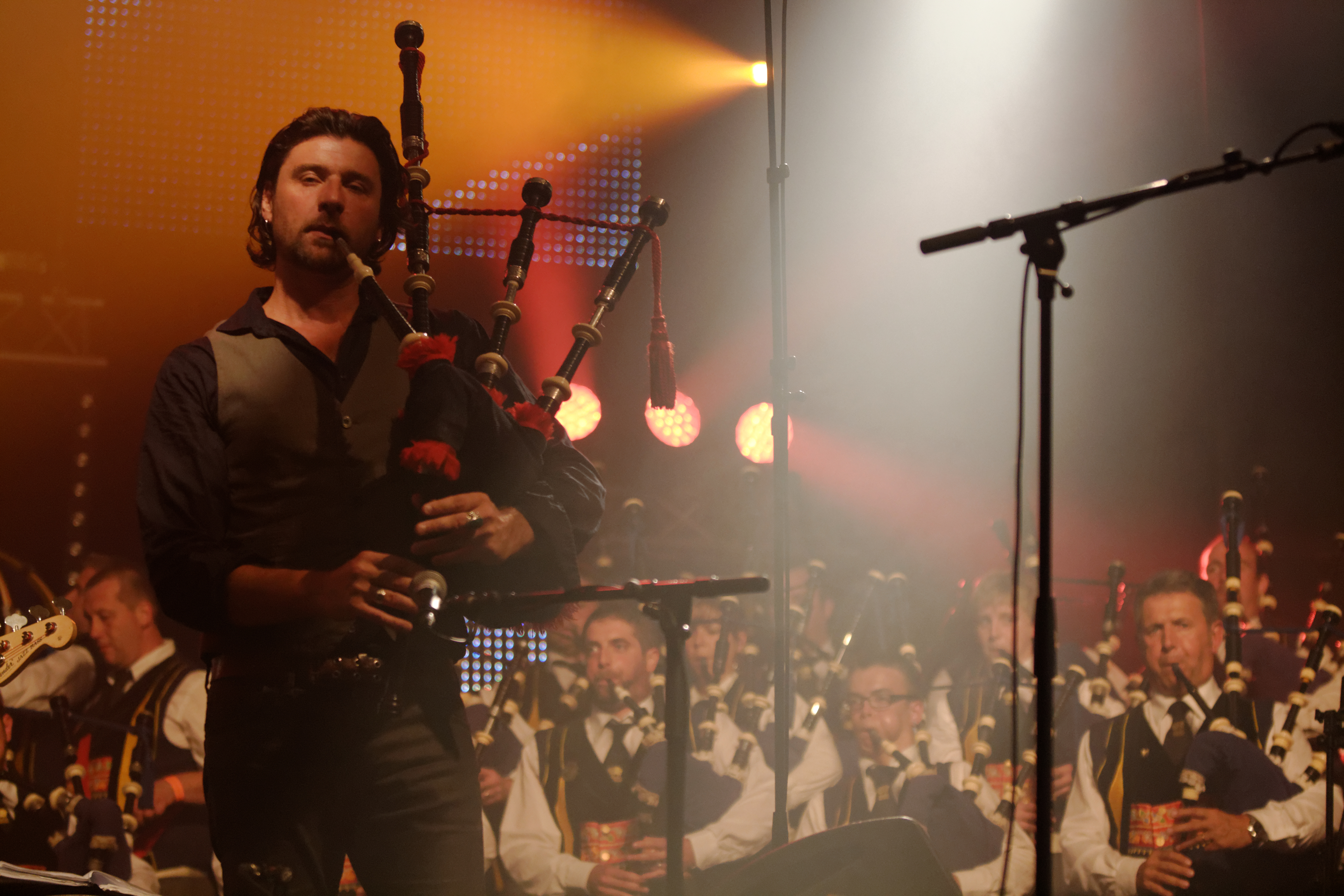 Dan Ar Braz et le bagad Kemper en concert à l'espace Gradlon lors du festival de Cornouaille 2013, à l’occasion des 90 ans du Cornouaille et des 20 ans de la création de l’Héritage des Celtes.